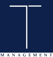 Logo von Trump Model Management